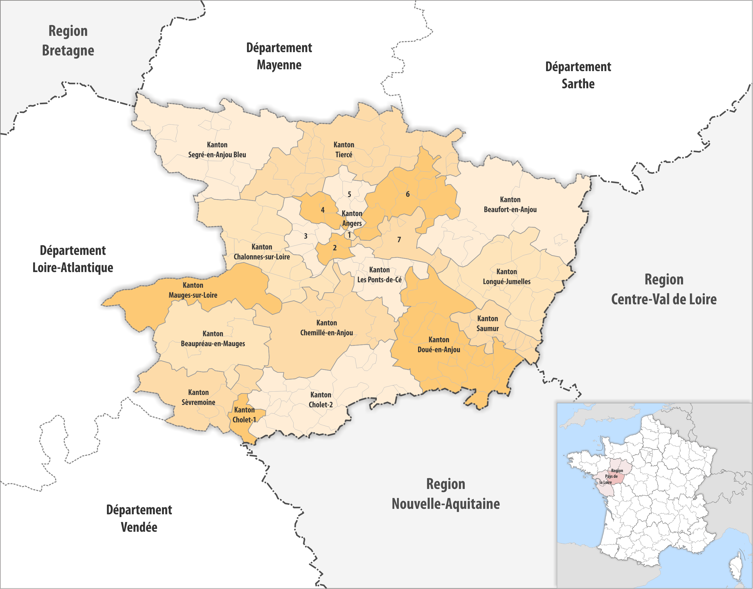 Gemeinden und Kantone im Departement Maine-et-Loire